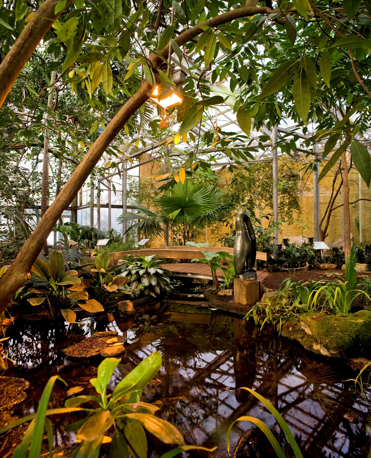 Das Vogeltropenhaus im Zoo Krefeld